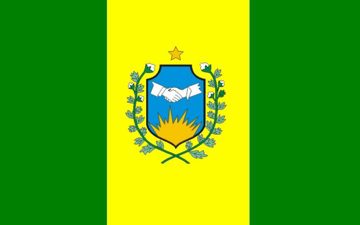 Bandeira de Baixio - CE